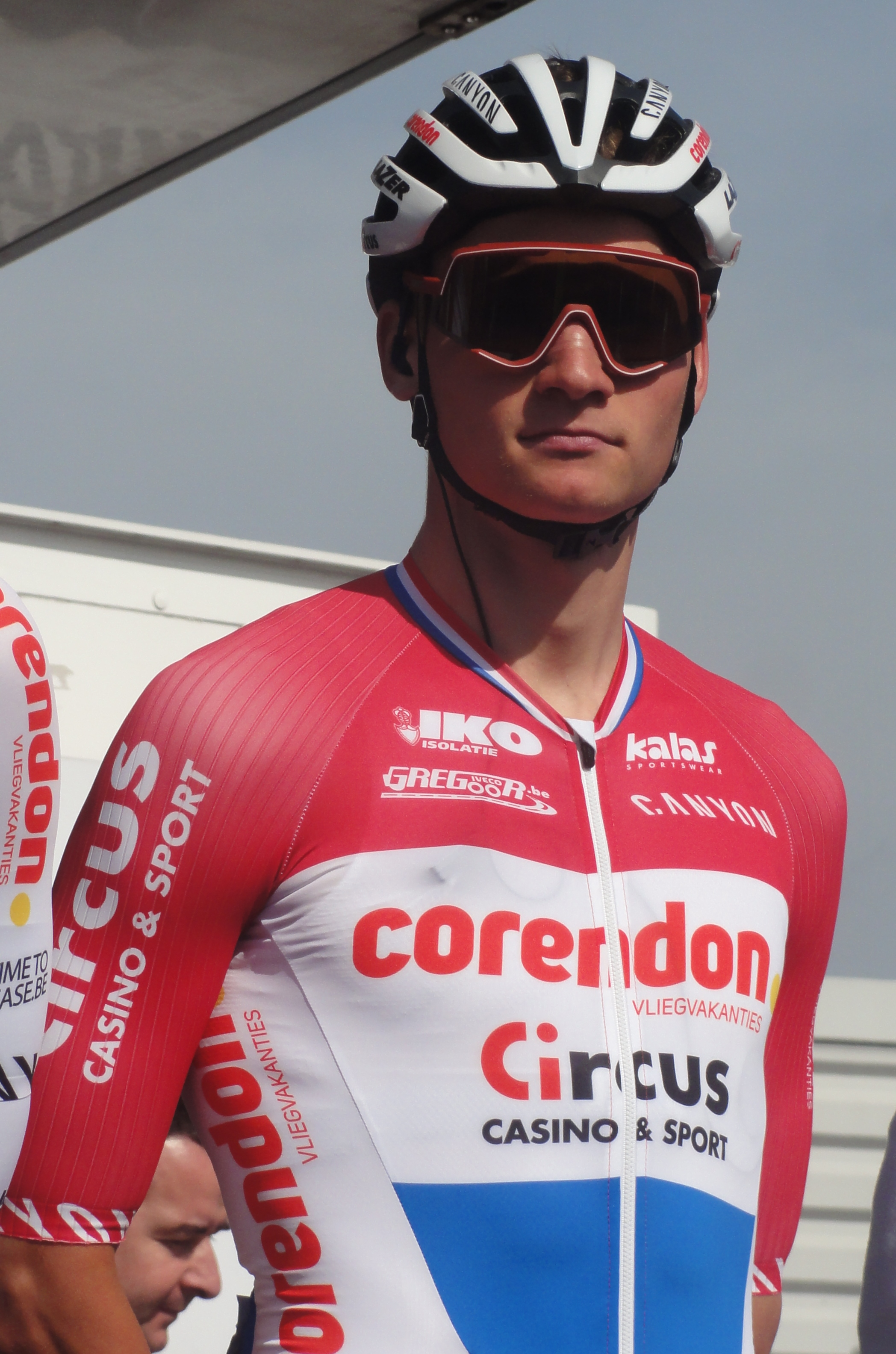 Reportage réalisé le dimanche 24 mars à l'occasion du départ et de l'arrivée du Grand Prix de Denain 2019 à Denain, Nord, Nord-Pas-de-Calais-Picardie, France.